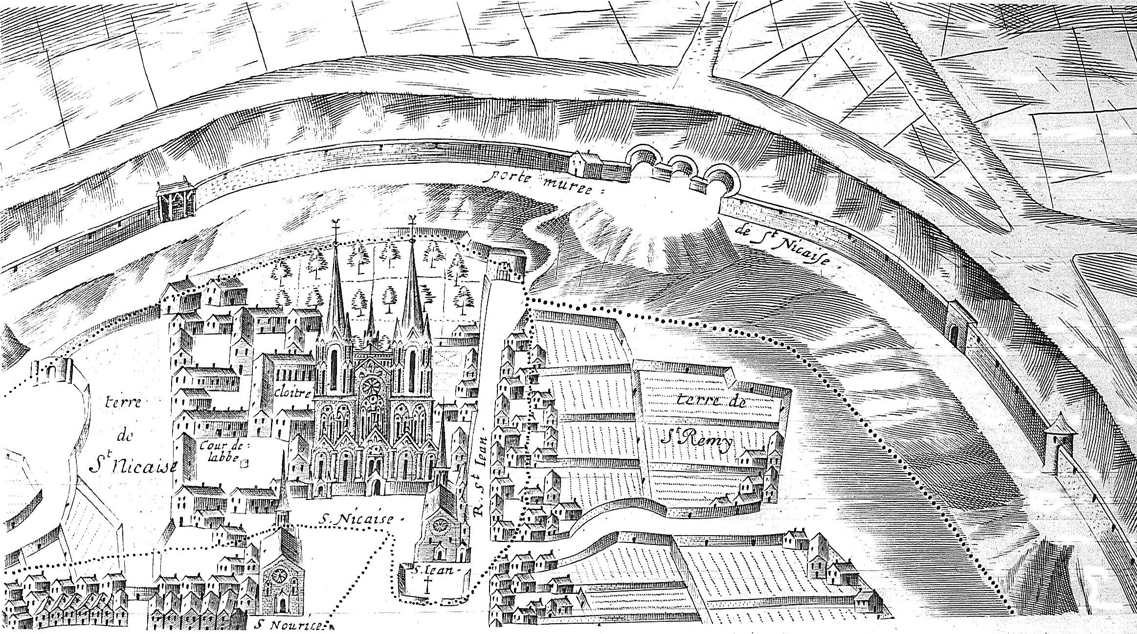 un dessin de l'ancienne abbaye st-Naicaise de Reims.